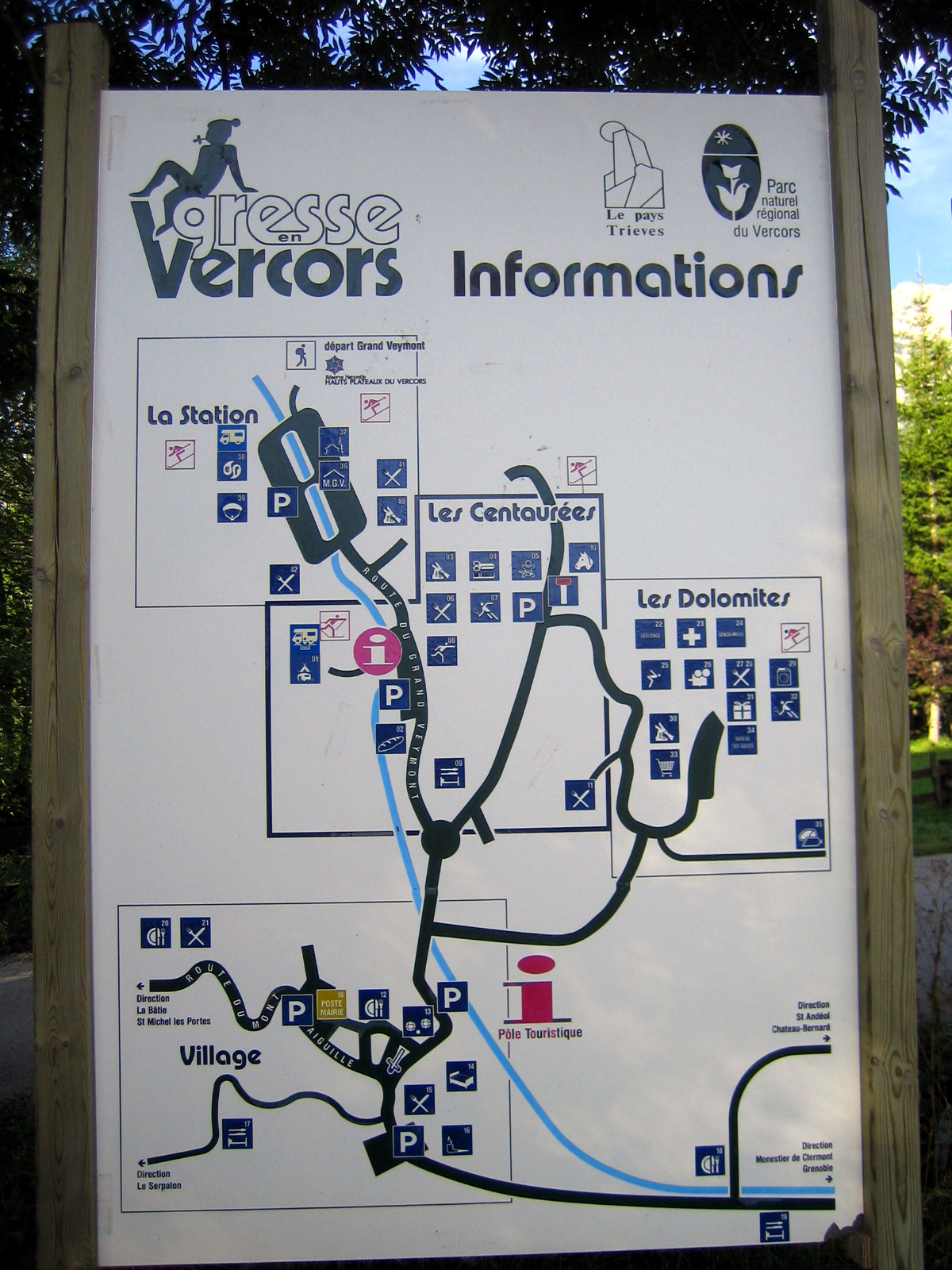 Gresse-en-Vercors (Isère, France) - Panneau touristique, devant (en contrebas de) la résidence Les Centaurées. .